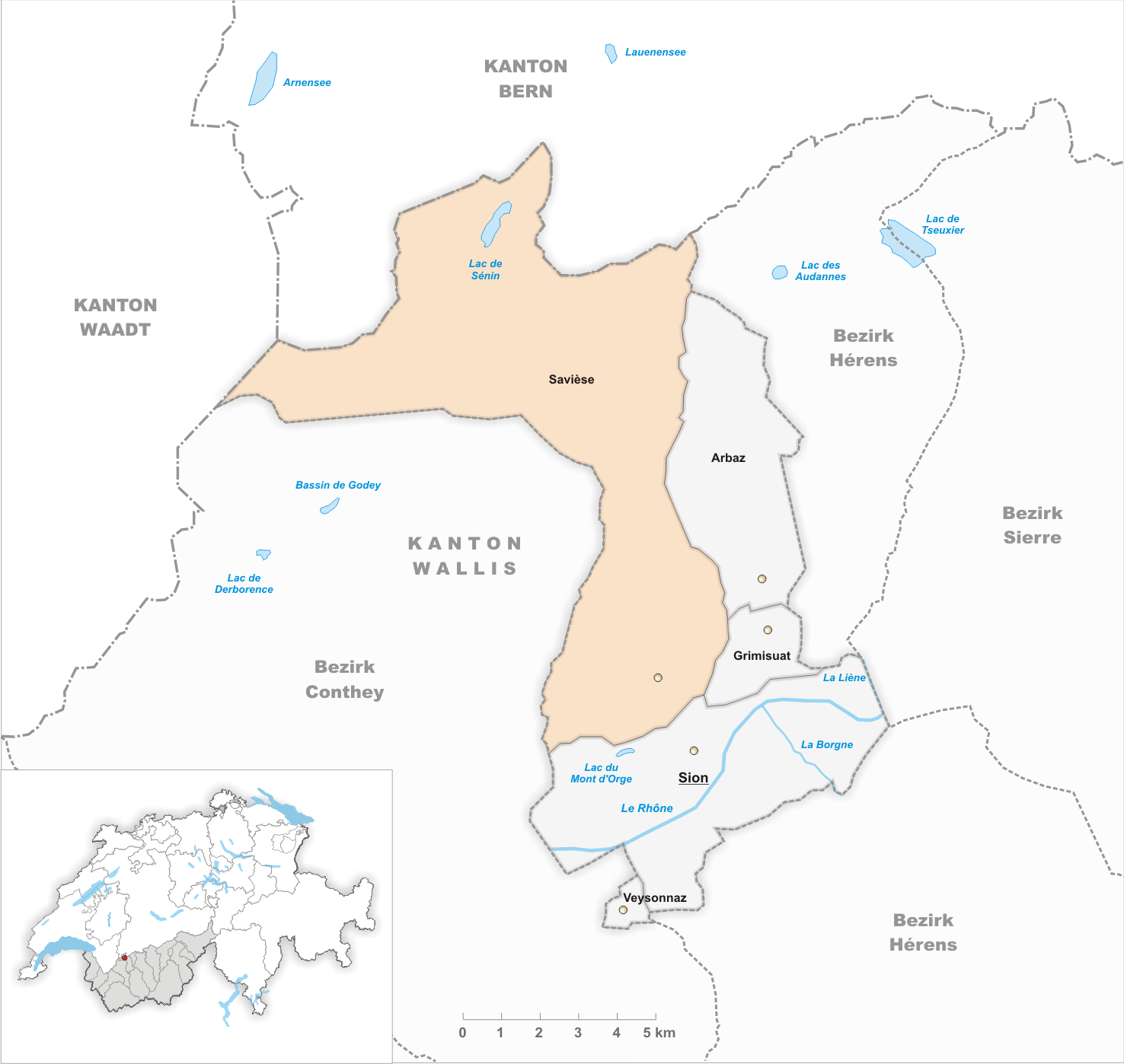 Municipality Savièse